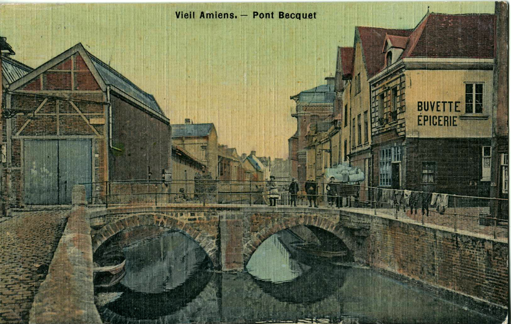 Carte postale ancienne, sans mention d'éditeur : VIEIL AMIENS - Pont Becquet